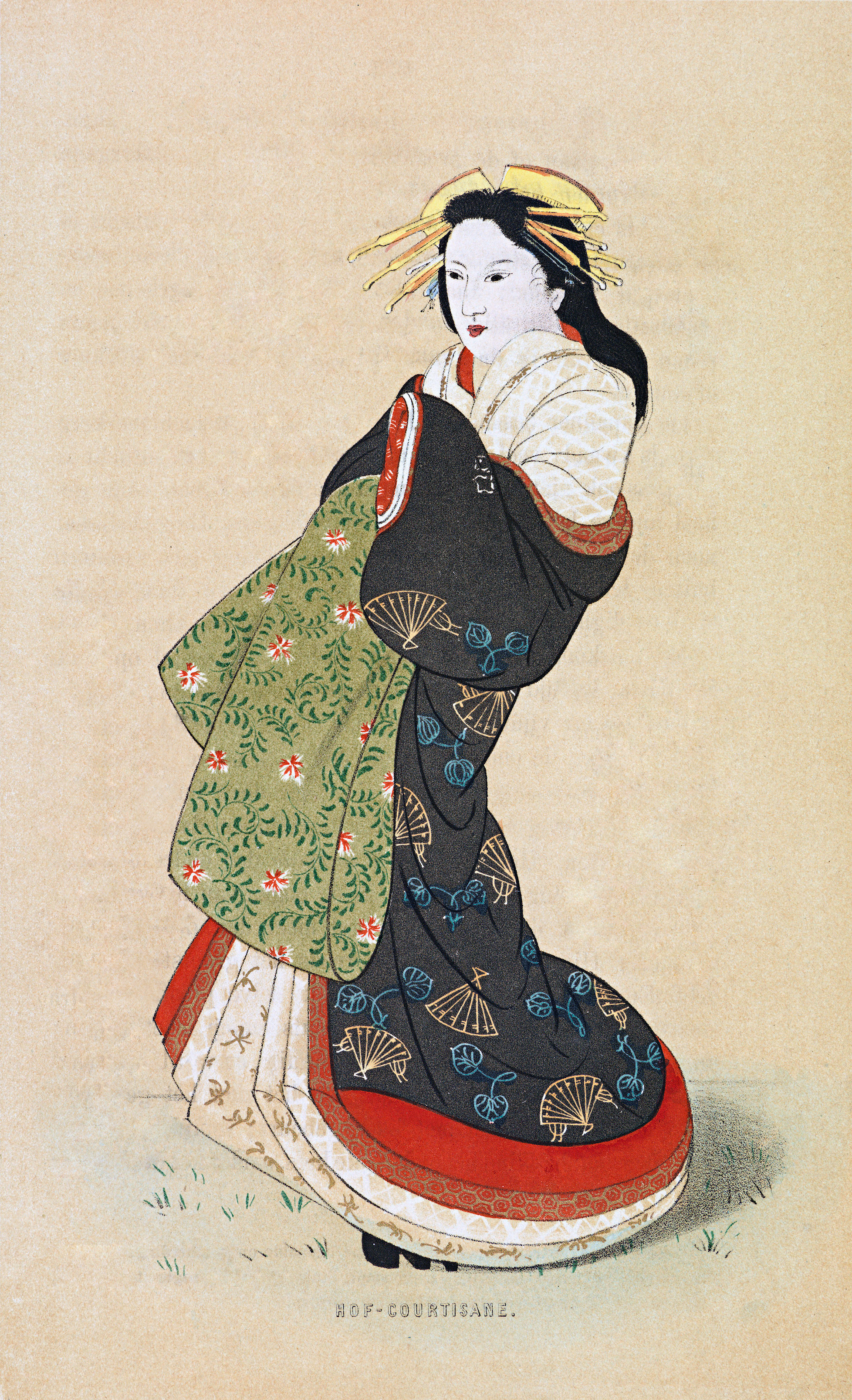 Prent Hofcourtisane, vrouw uit Jedo